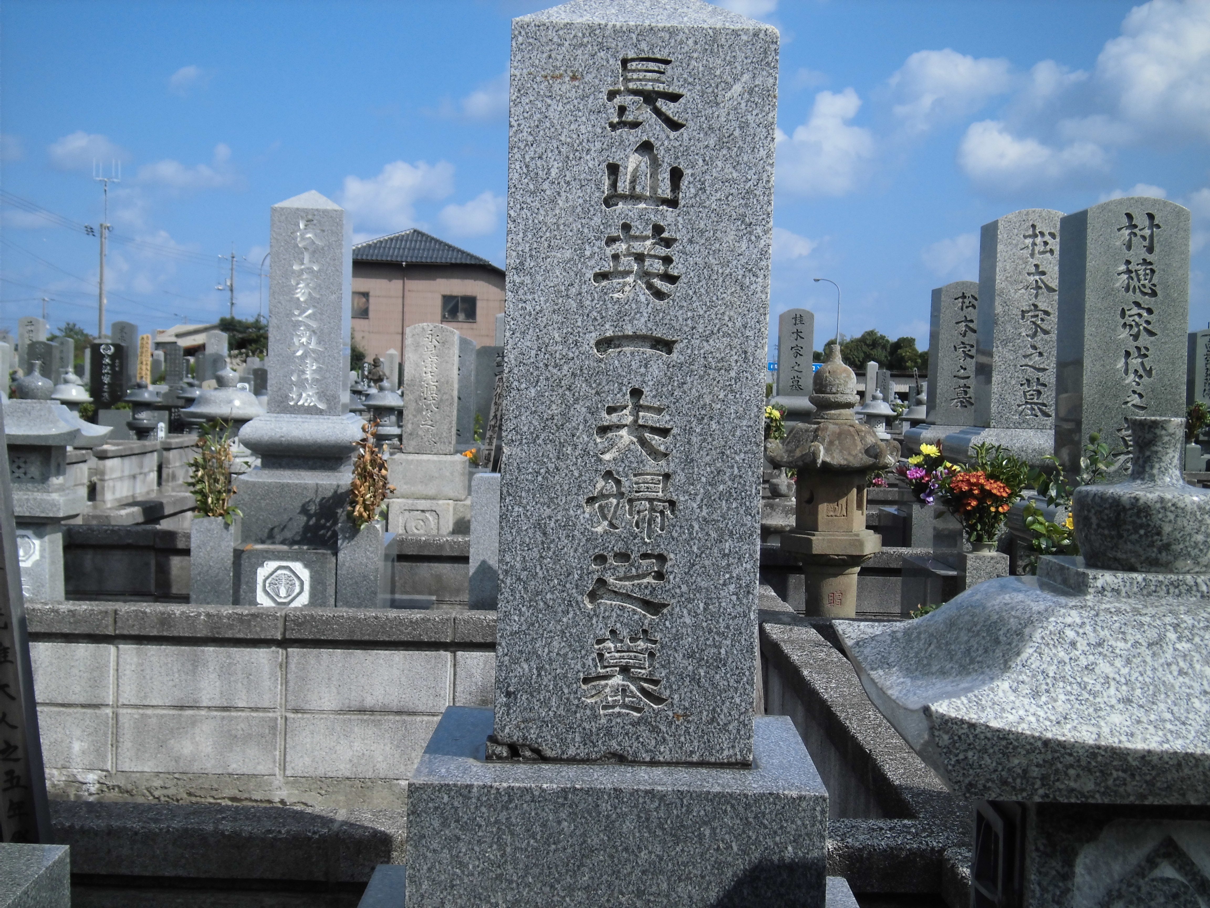 Nagayama_eiichi